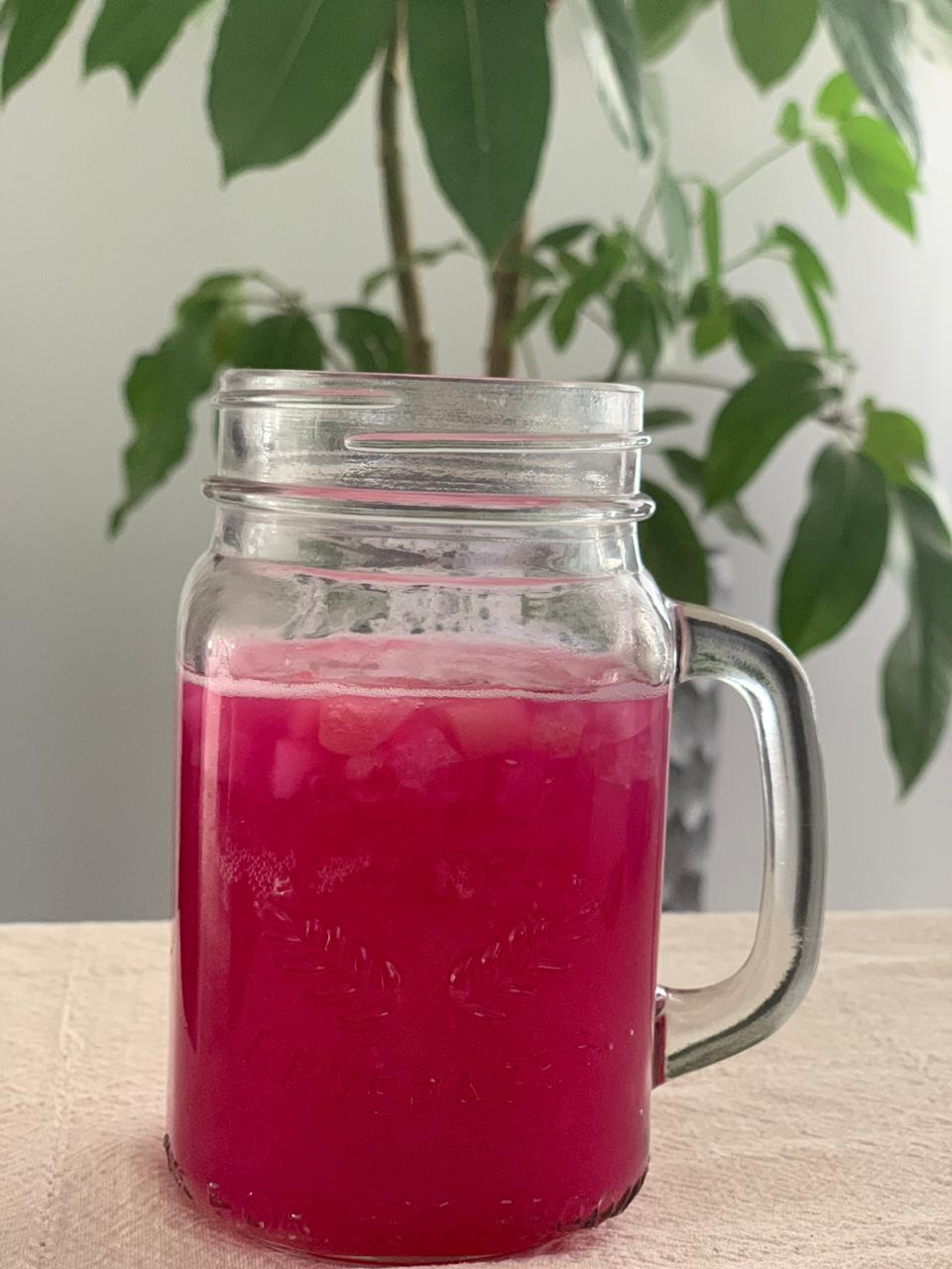 Vaso con Yaguana.